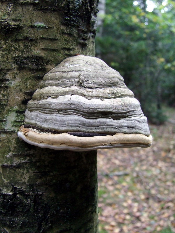 Fomes fomentarius. Karmėlava forest, Lithuania.